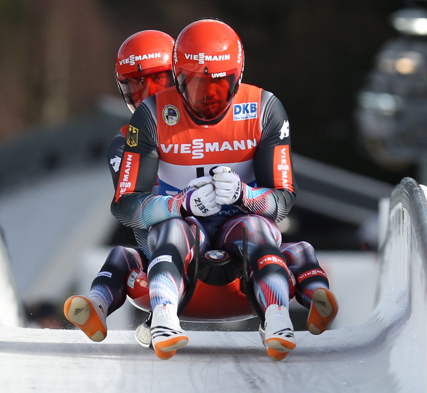 Tobias Wendl und Tobias Arlt beim Rennrodel-Weltcup der Doppelsitzer in Altenberg 2017